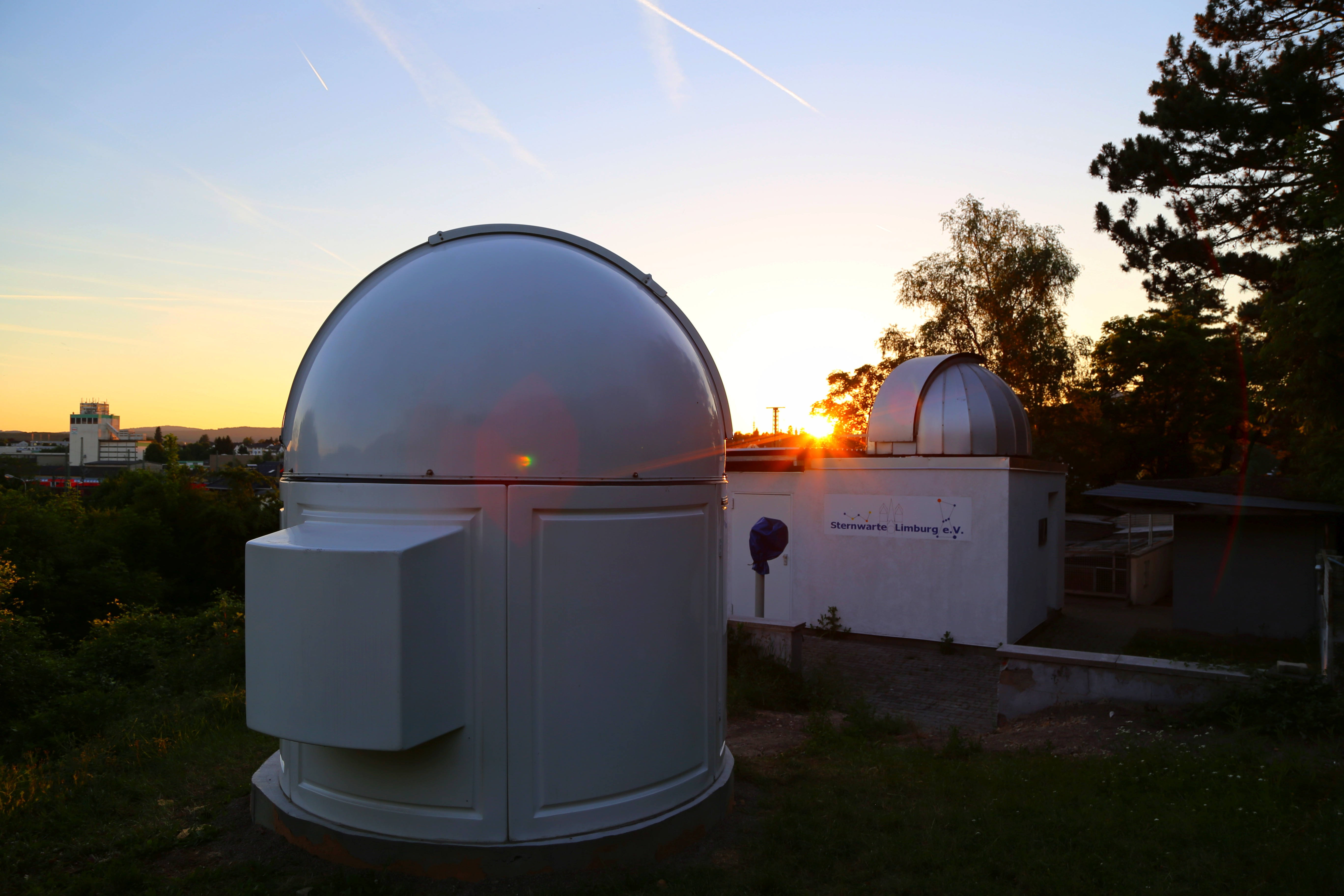 Beobachtungen der Sonnen mit je einem H-alpha-, Weißlicht- und Sonnenprojektions-Teleskop.